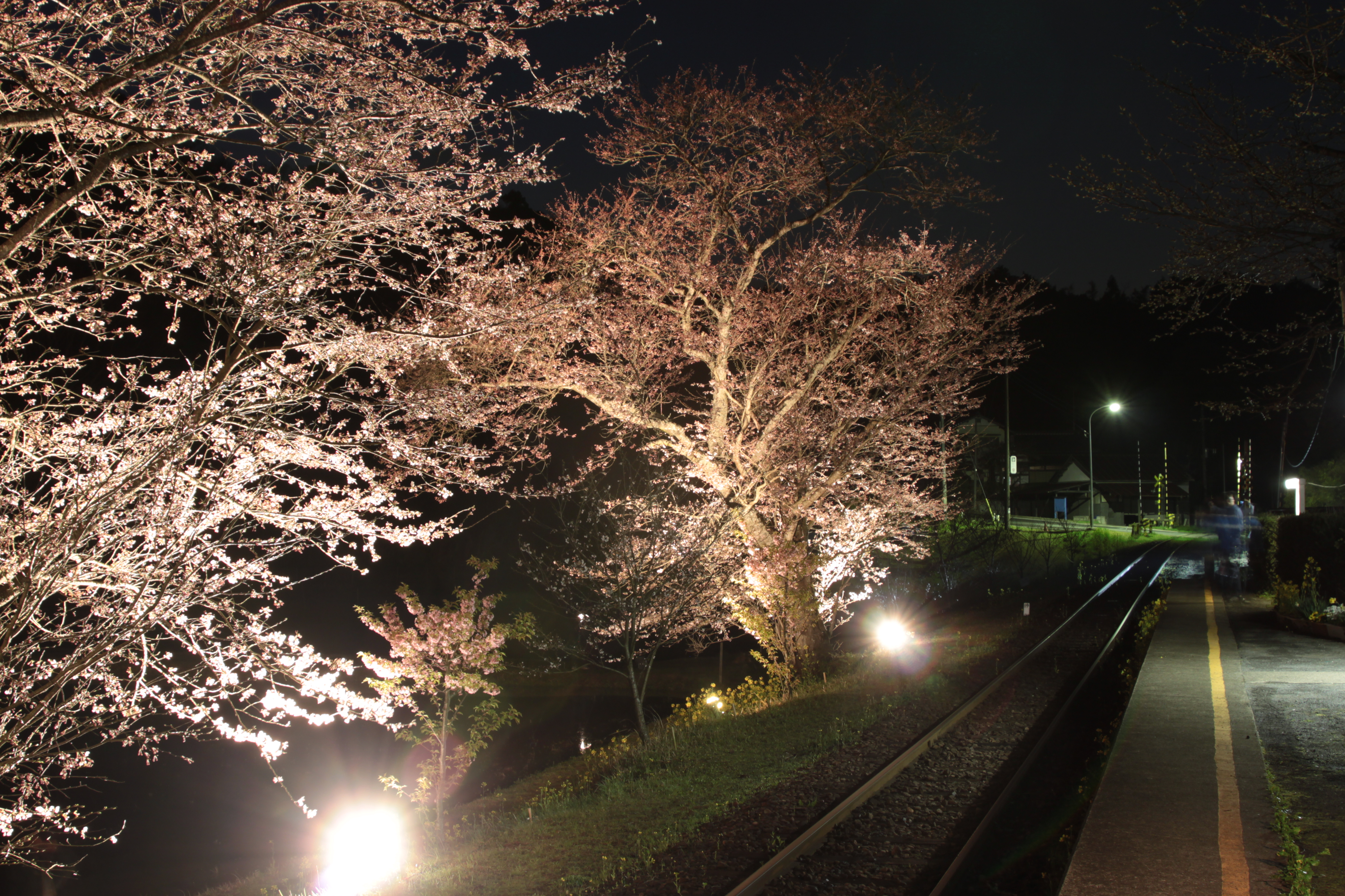 桜の季節にはライトアップされる飯給(いたぶ)駅